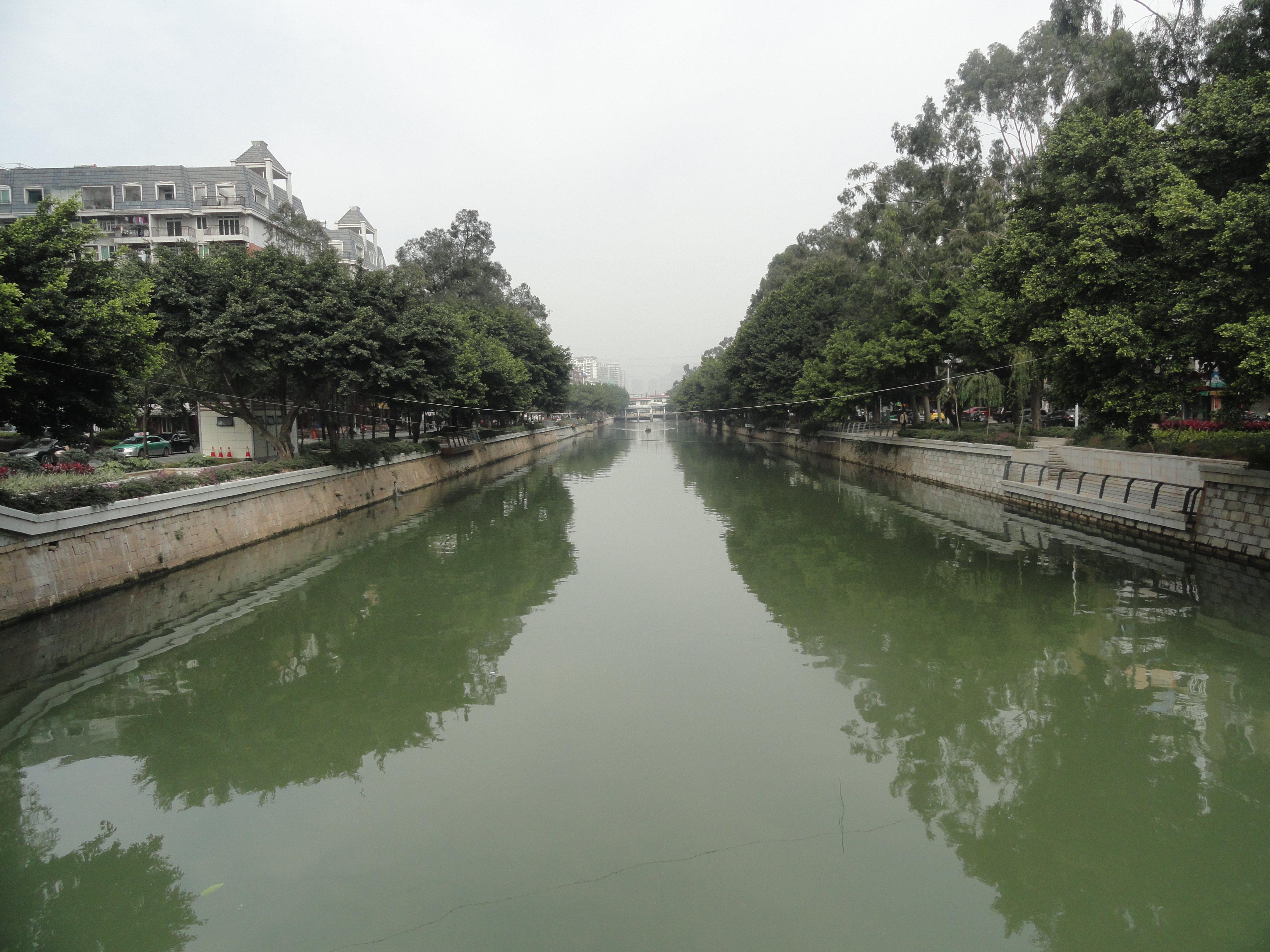 中文（中国大陆）: 在华林路上拍摄福州晋安河